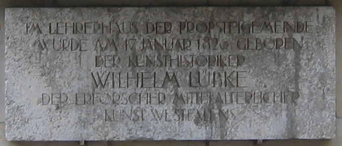 Gedenkstein an die Geburt des Kunsthistorikers Wilhelm Lübke am Propsteihof Dortmund Eigene Aufnahme August 2006 Die Gedenktafel Wilhelm Lübkes befindet sich nicht mehr am "Geburtshaus"; dieses wurde Mitte der achtziger Jahre des 20. Jahrhunderts abgerissen. Erst nach langer Zeit, etwa 1995, wurde die Steinplatte an einem Neubau angebracht, der ca. 50 Meter vom ehemaligen Geburtshaus entfernt steht.Das Geburtshaus Wilhelm Lübkes war ein im 19. Jahrhundert verfallender Flügel des ehemaligen Dominikanerklosters. Siehe hierzu seine "Lebenserinnerungen", 1891 bei Friedrich Fontane in Berlin erschienen. Dr. Wolfgang Rinke Basaltweg 5 44269 Dortmund EM